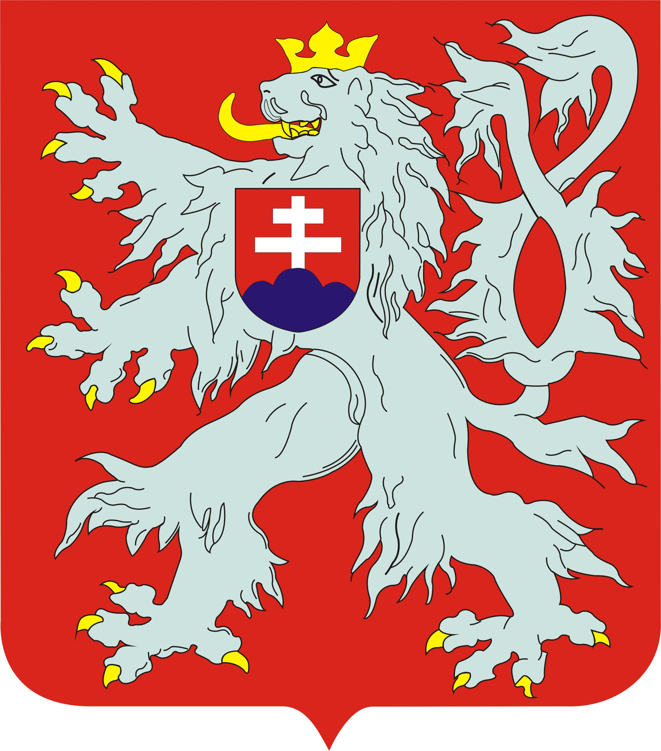 Malý štátny znak Česko-Slovenskej republiky bol prijatý v roku 1920. Jeho autorom bol maliar František Kysela